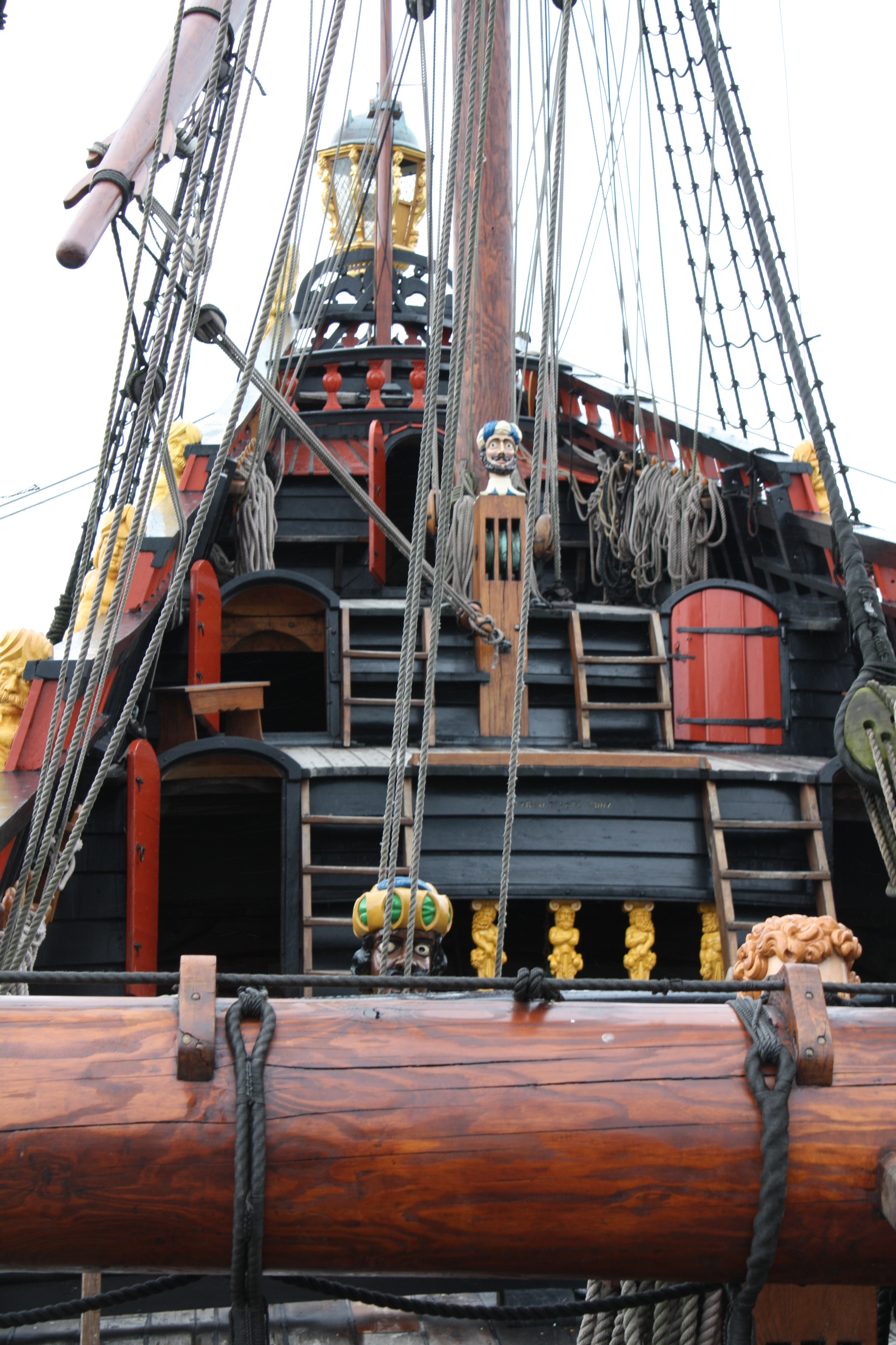 Achterschiff samt Poop des V.O.C.-Schiffes Batavia (Nachbau)